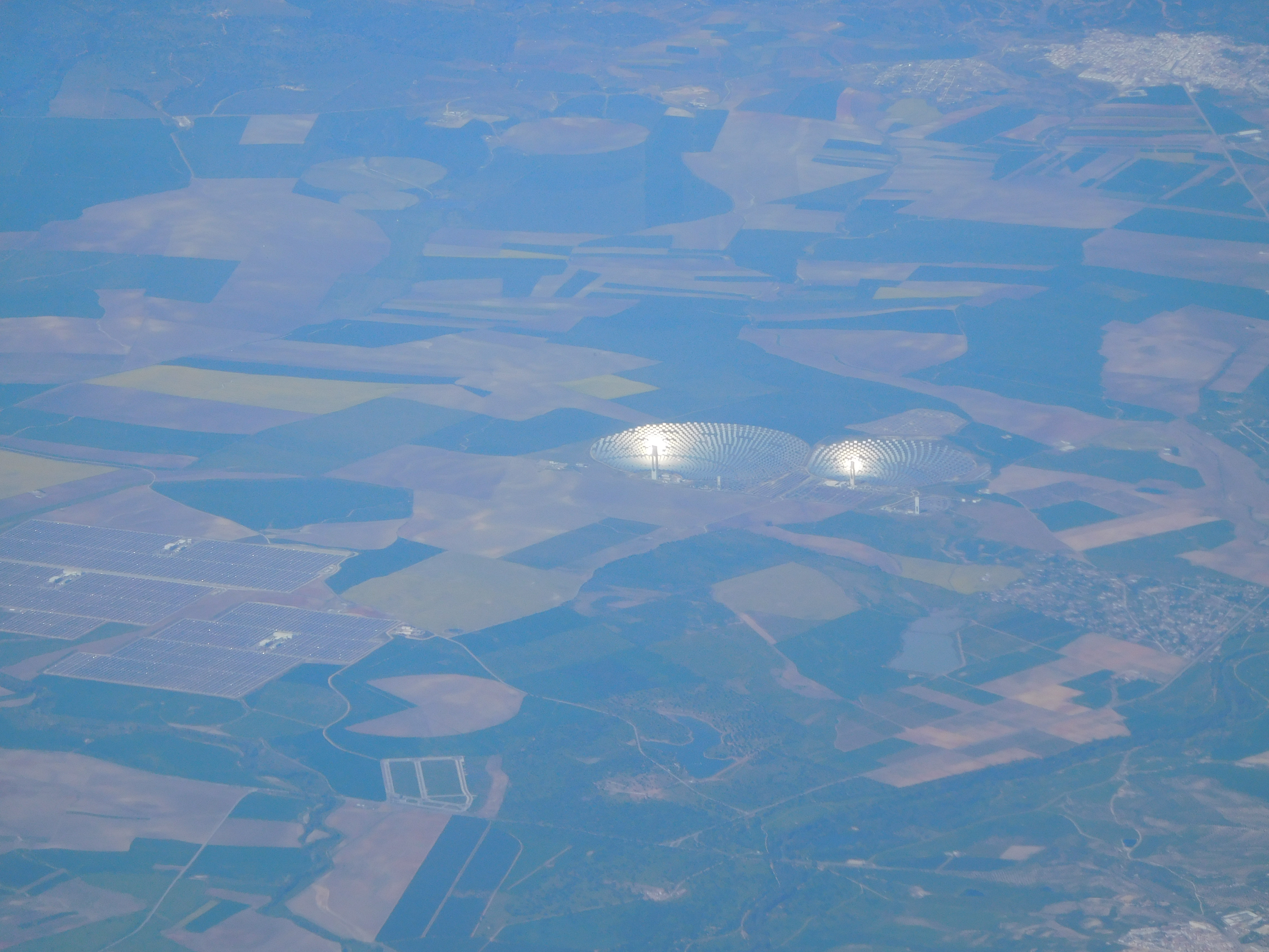 Solarwärmekraftwerk PS10 aus dem Flugzeug